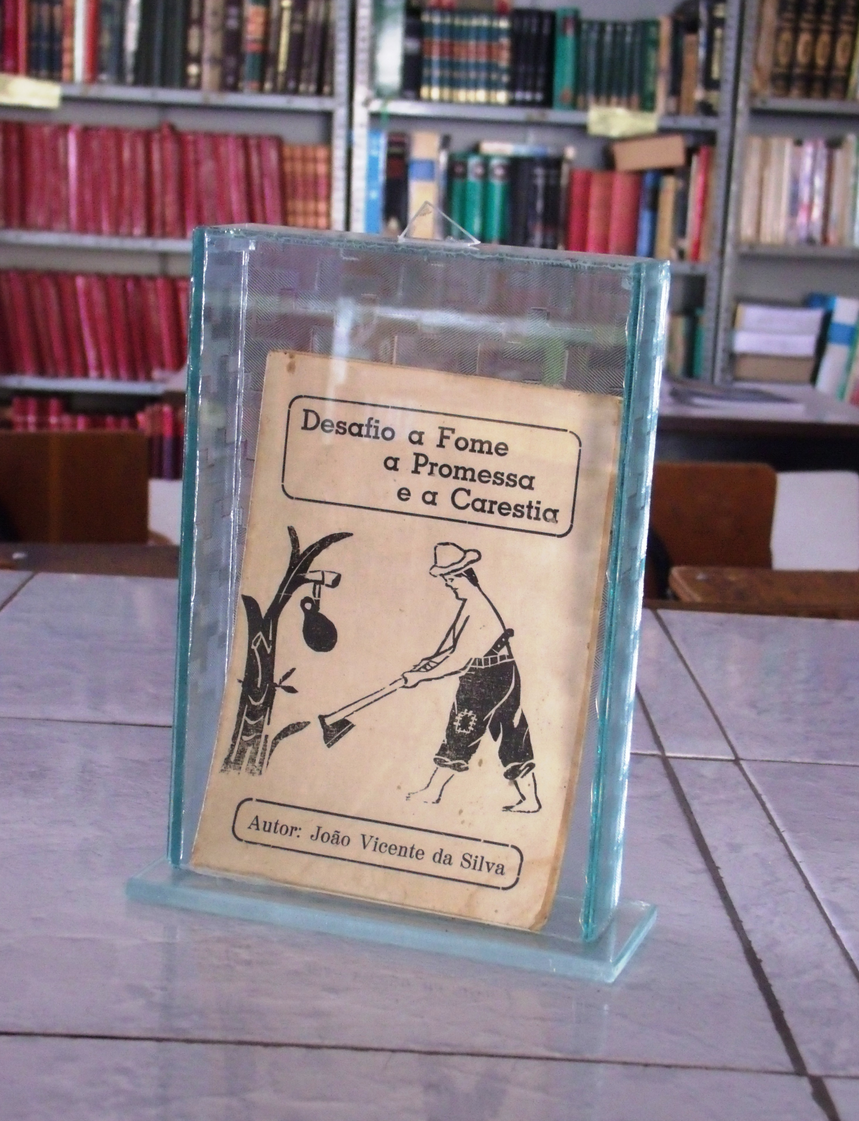 Literatura de Cordel em exposição numa bibliteca pública.É de autoria do poeta popular João Vicente da Silva.